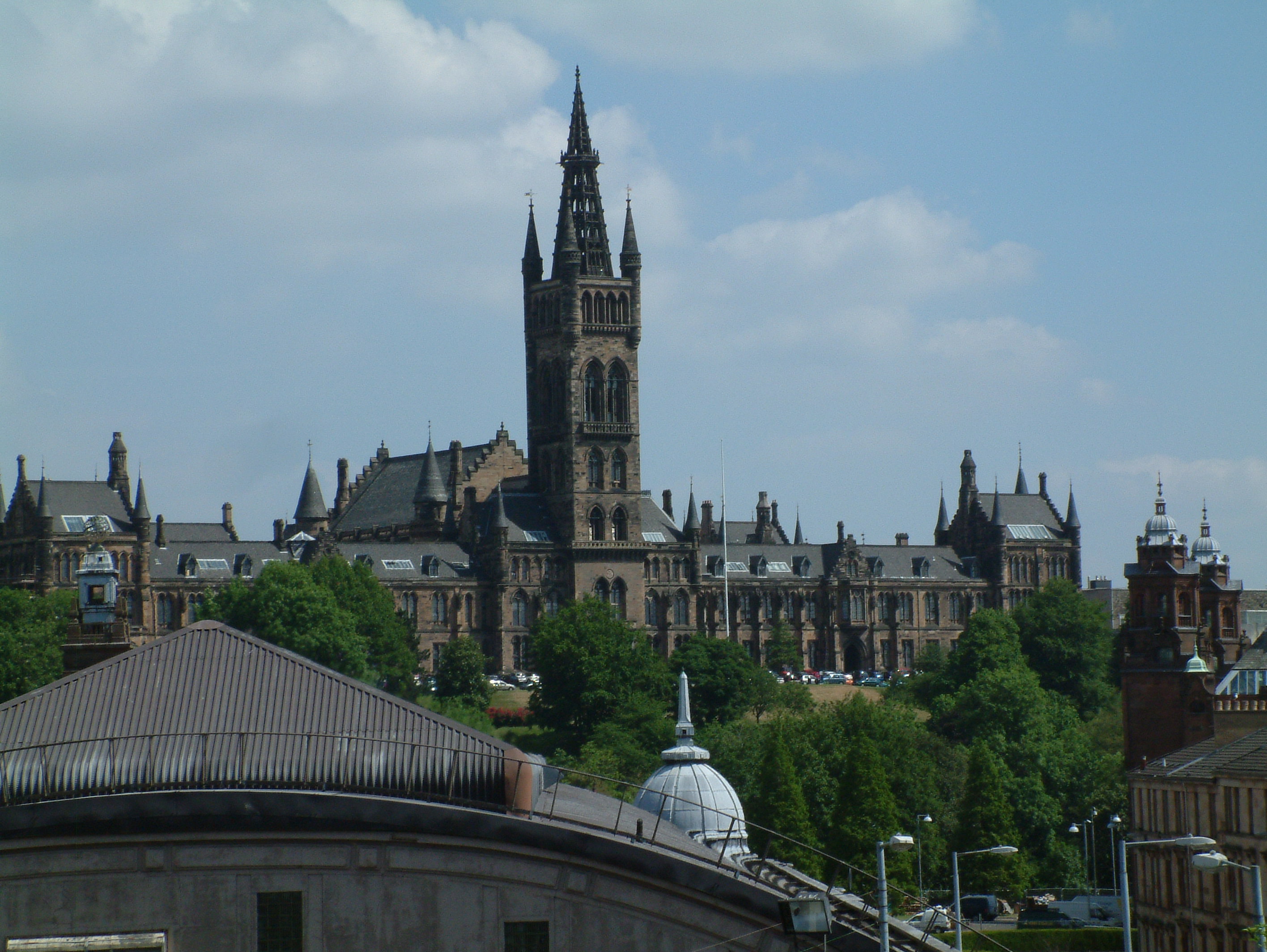 vlastni foto